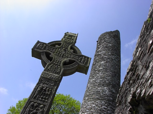 Croix maitresse du cimetière de Monasterboice